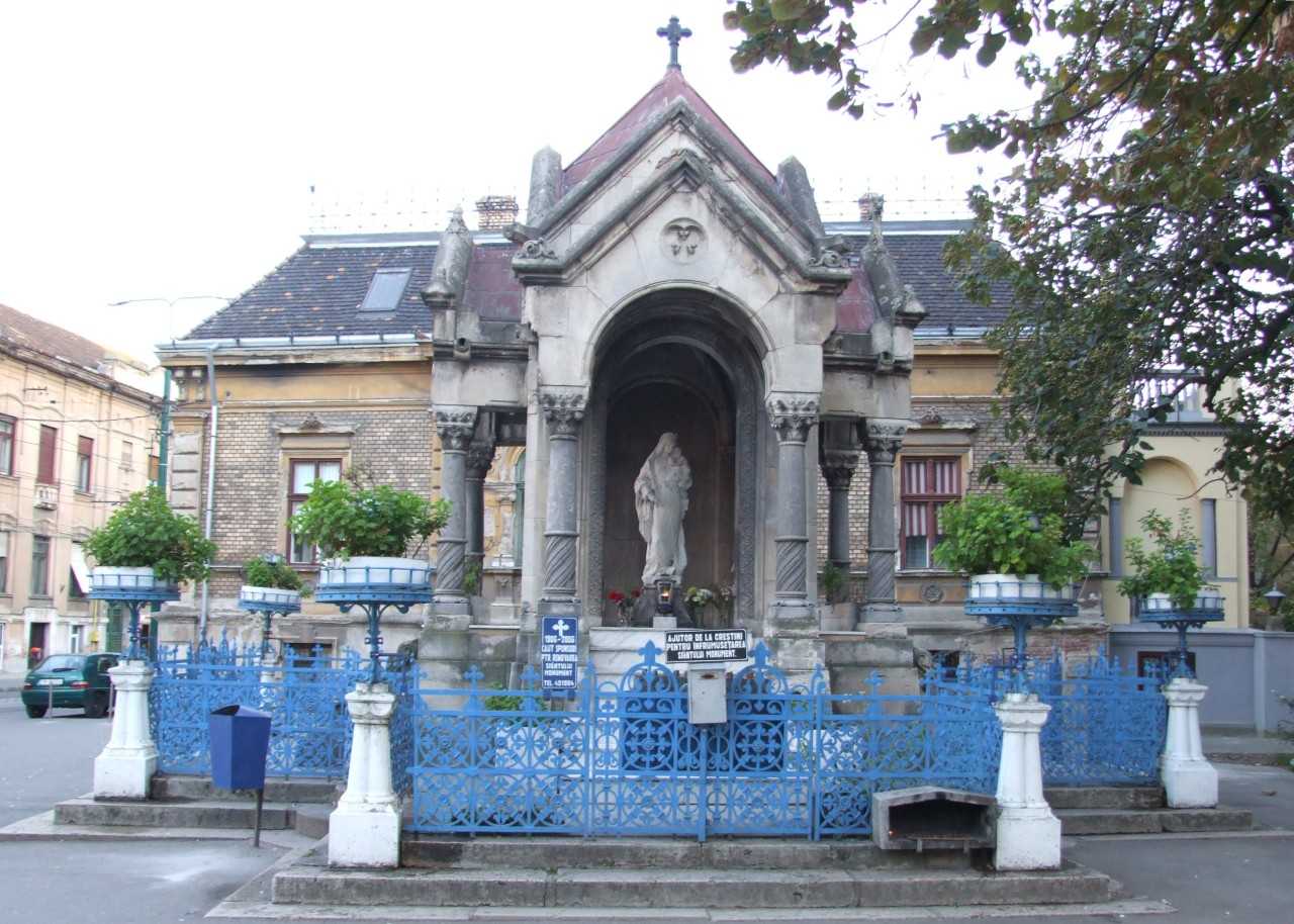 Parohia Reformata Timişoara